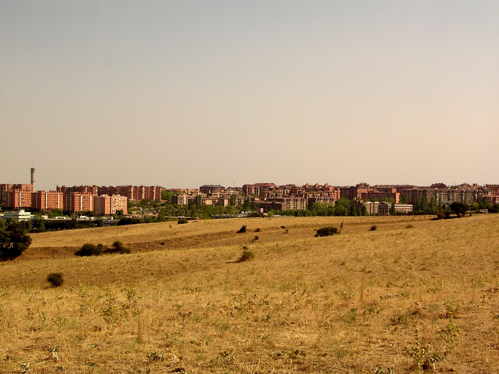 Tres Cantos, Madrid, Spain